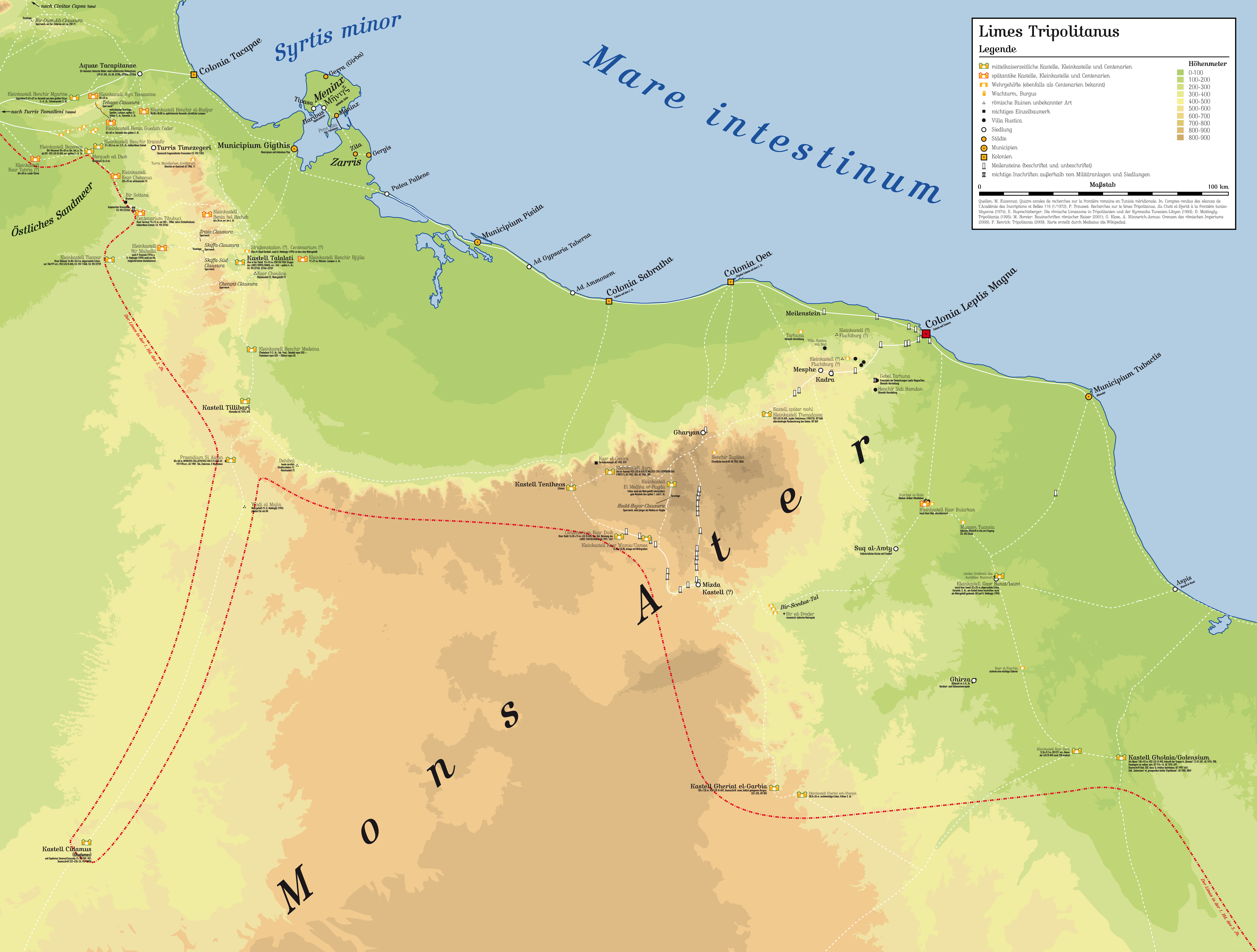 Der Limes Tripolitanus in der Provinz Africa proconsularis – hier im Raum Libyen und Tunesien.